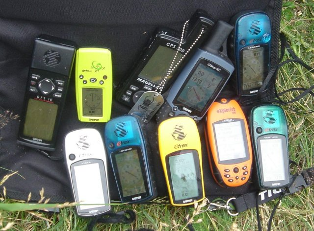 Receptores GPS civiles. A picture of a geocaching travelbug in an "action shot". The GPS-receiver with a dogtag attached is the travelbug. This particular travelbug has the mission to "Get around and make friends with other GPS receivers". In this case, quite a lot of friendly GPS receivers gathered for a group hug. Photo by Christian Vandsø Andersen